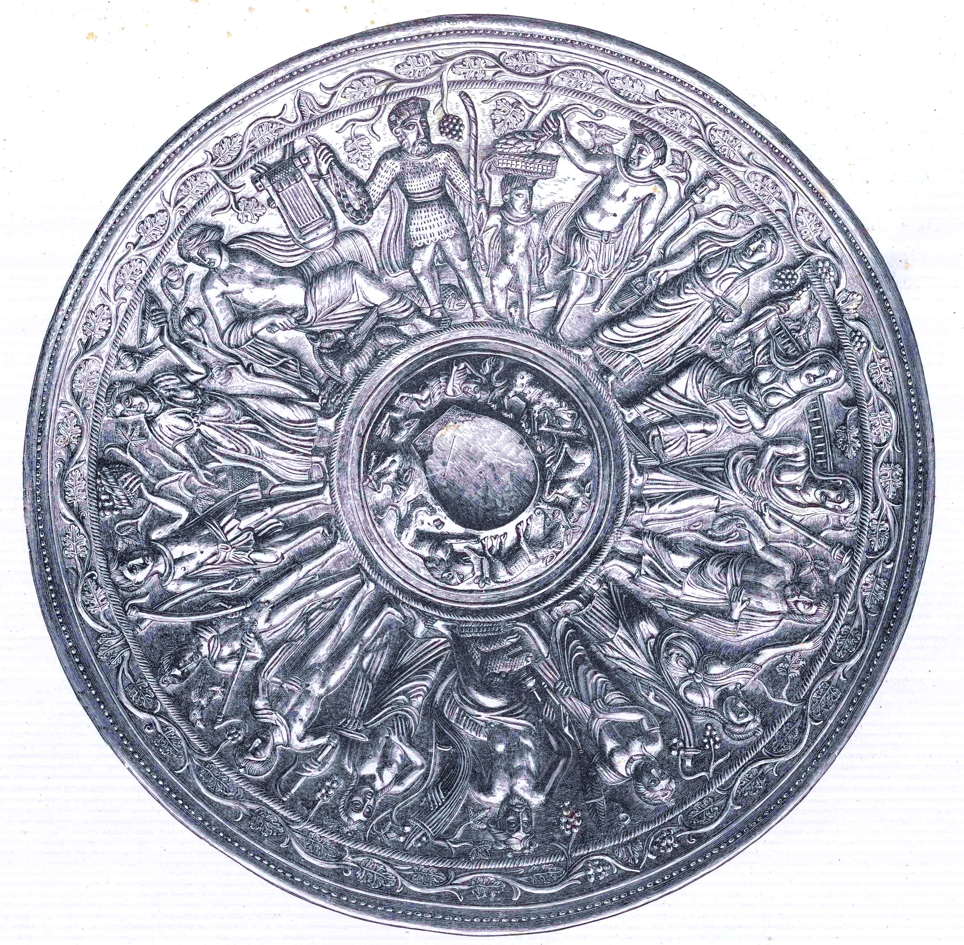 Patera - Stampa lui Odobescu